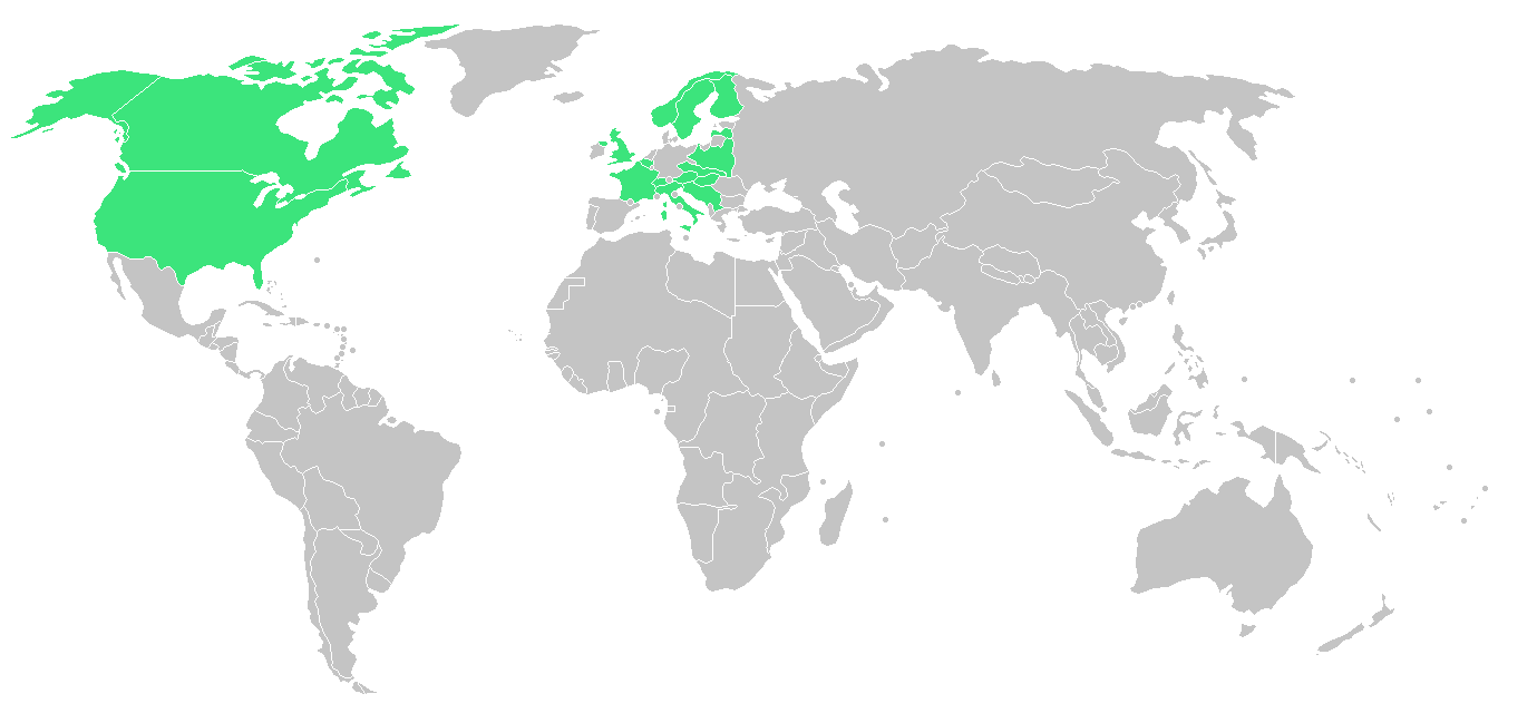 Pays participant aux Jeux olympiques d'hiver de 1924 à Chamonix